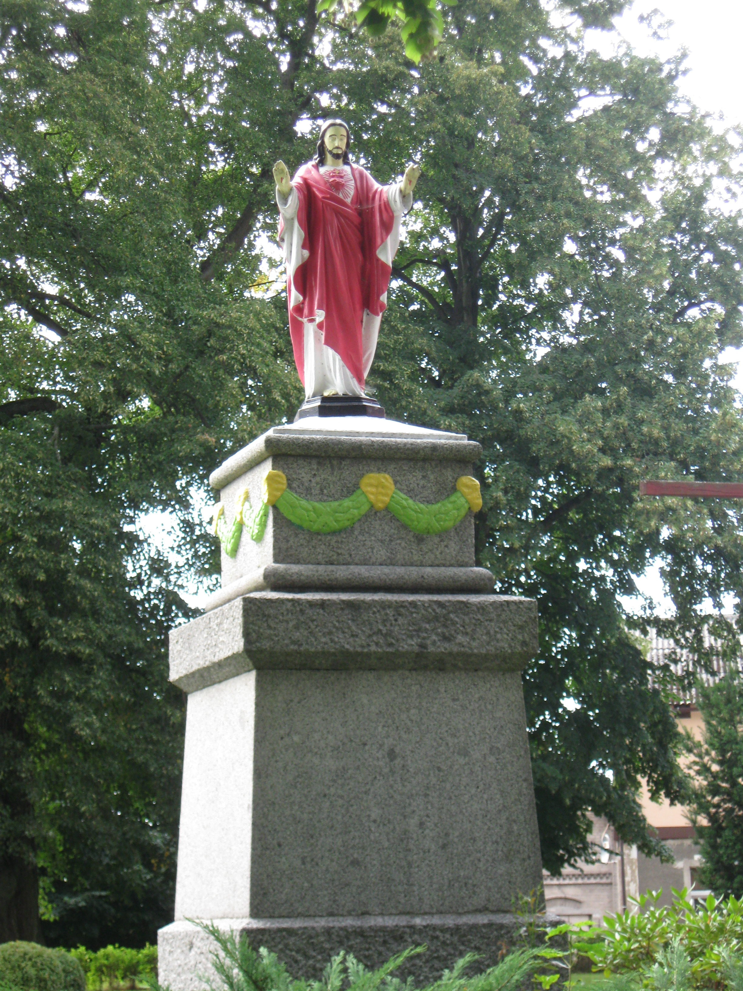 Statua Jezusa Chrystusa stojąca na cokole pomnika niemieckich mieszkańców Gorawina poległych w czasie I wojny światowej (tablica z listą poległych, część środkowa z cokołu i krzyż żelazny ze szczytu zostały zakopane w l. 50. XX w.) obok kościoła w Gorawinie